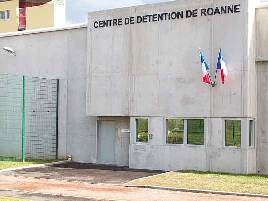 Le centre pénitentiaire de Roanne, centre de detention de Roanne.